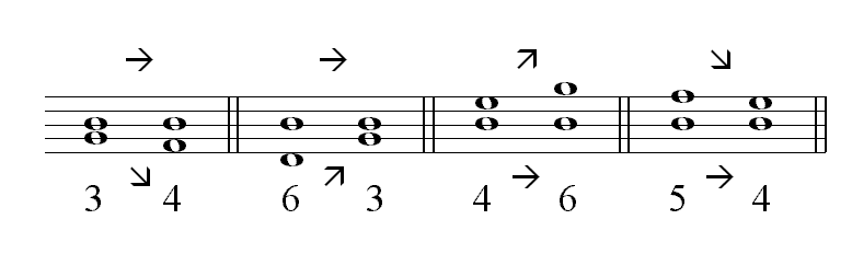 Description : Mouvement oblique Source : Personnelle Licence : GFDL